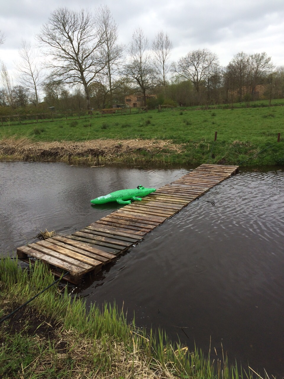 Palletbrug